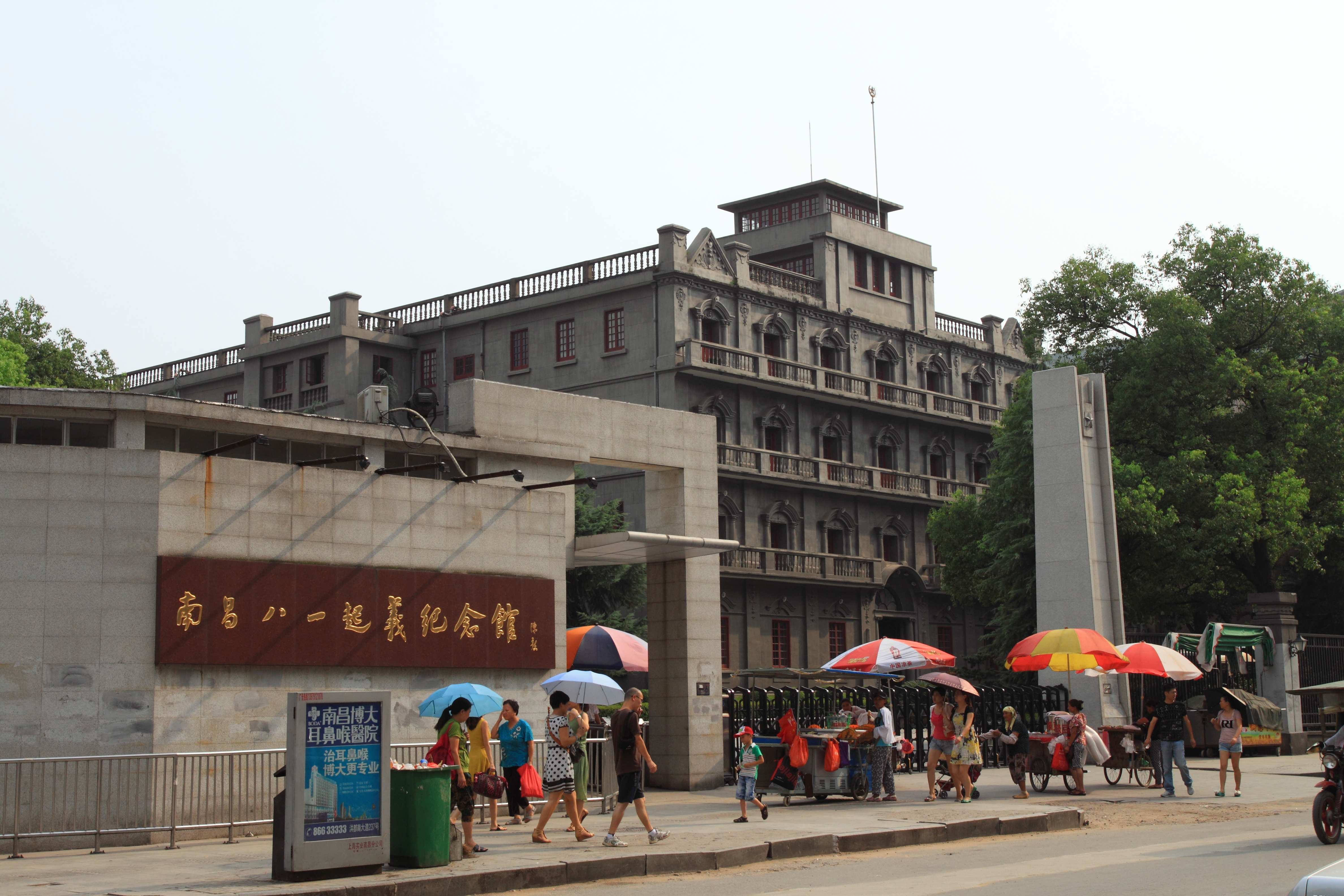 南昌八一起义纪念馆（原江西大旅社），位于中国江西省南昌市。